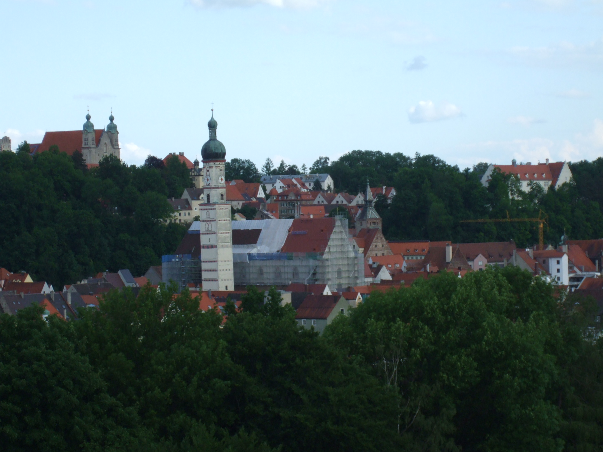 Blick auf die Altstadt von Landsberg am Lech aus Richtung Nord-Westen. Fotografiert vom Riesenrad auf der Landsberger Wiesn 2008.